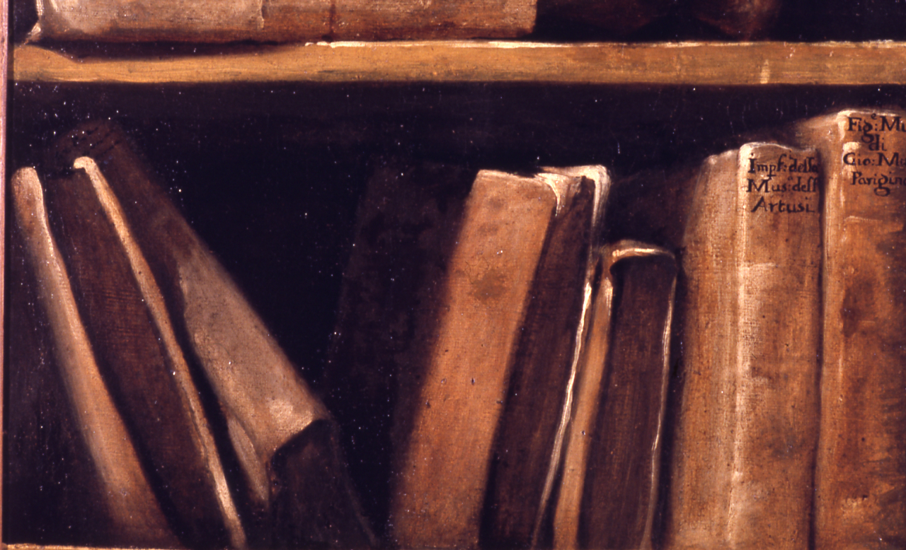 Particolare del trompe l'oeil che rappresenta le ante di una libreria appartenuta a Padre Giambattista Martini (sinistra cm. 165,5x78; destra cm. 165,5x75,5). Museo internazionale e biblioteca della musica di Bologna. Servizio fotografico : Bologna, 1982 / Paolo Monti. - Foglio: 1, Fotogrammi complessivi: 8/20 : Diapositiva, sviluppo cromogeno/ pellicola ; 35 mm. - ((All'interno della scatola in cui sono contenute queste diaposiutive si trova un appunto manoscritto riportante: "Quadri Pinacoteca Bologna. Crespi - Librer. Cponservat". - Fonte: Agenda di Paolo Monti: Diapositive 24x36mm (1948-1982), presso Archivio Paolo Monti